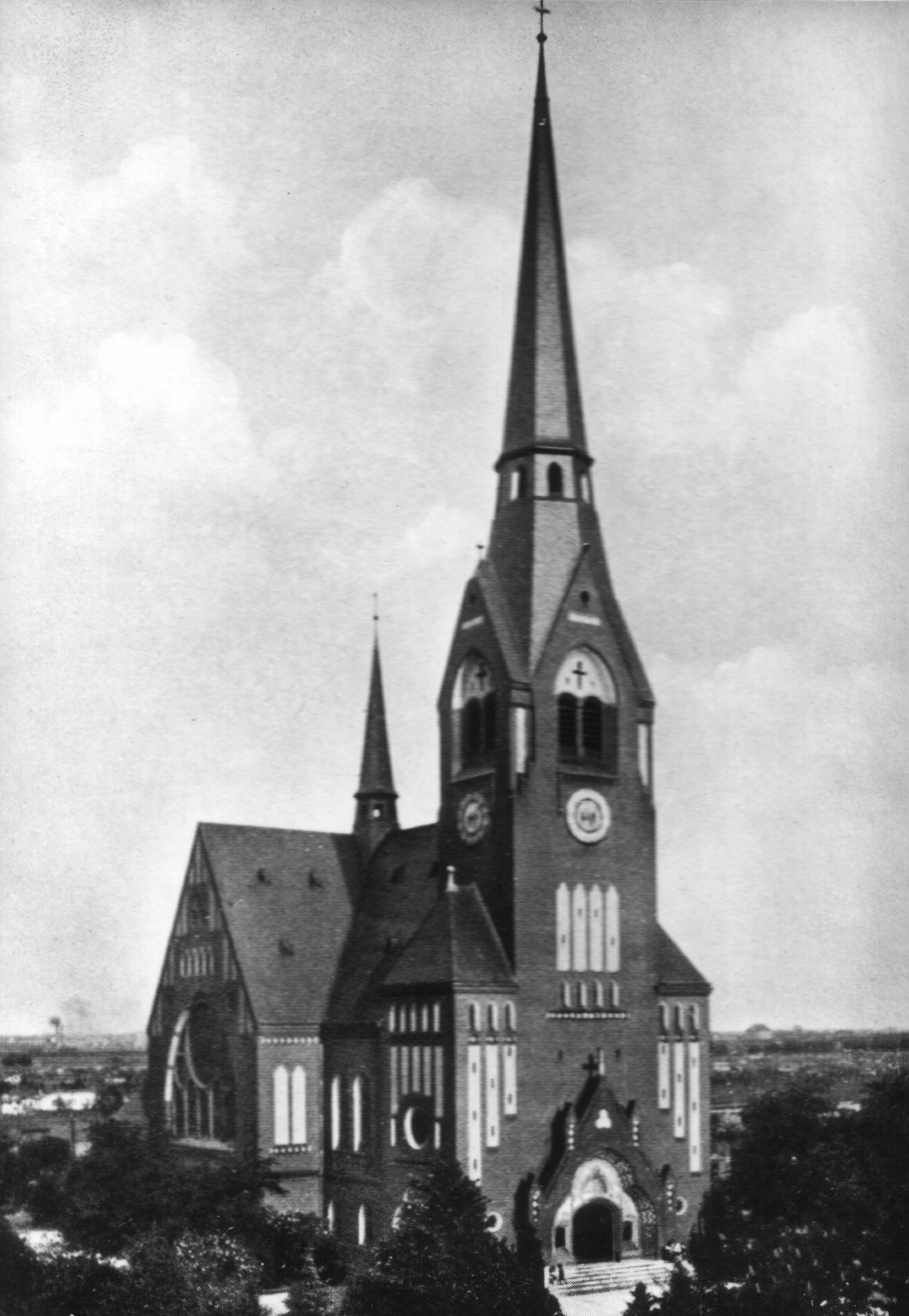 Blick auf die Kirche nach ihrer Einweihung